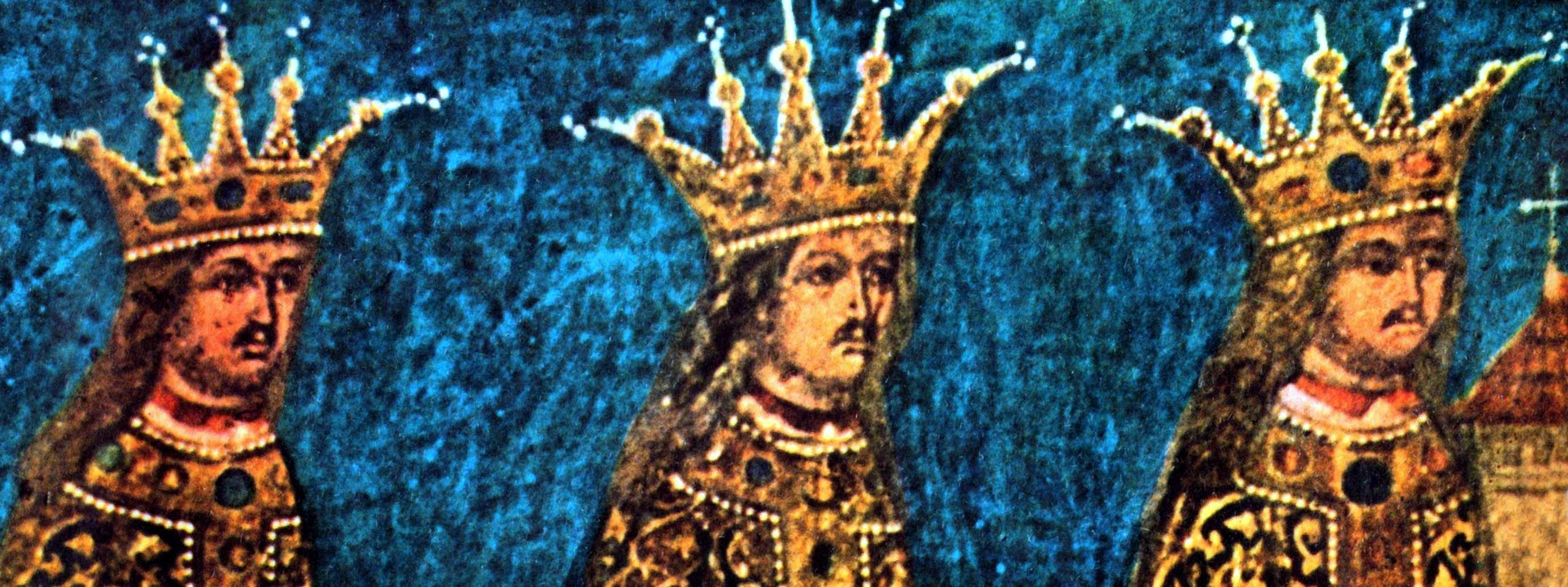 Ştefan cel Mare, Bogdan cel Orb and Petru Rareş. Fresco in Dobrovăţ monastery.